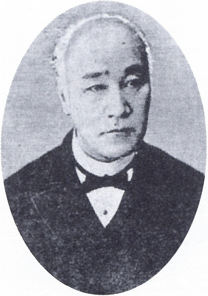 板倉勝達の肖像写真。